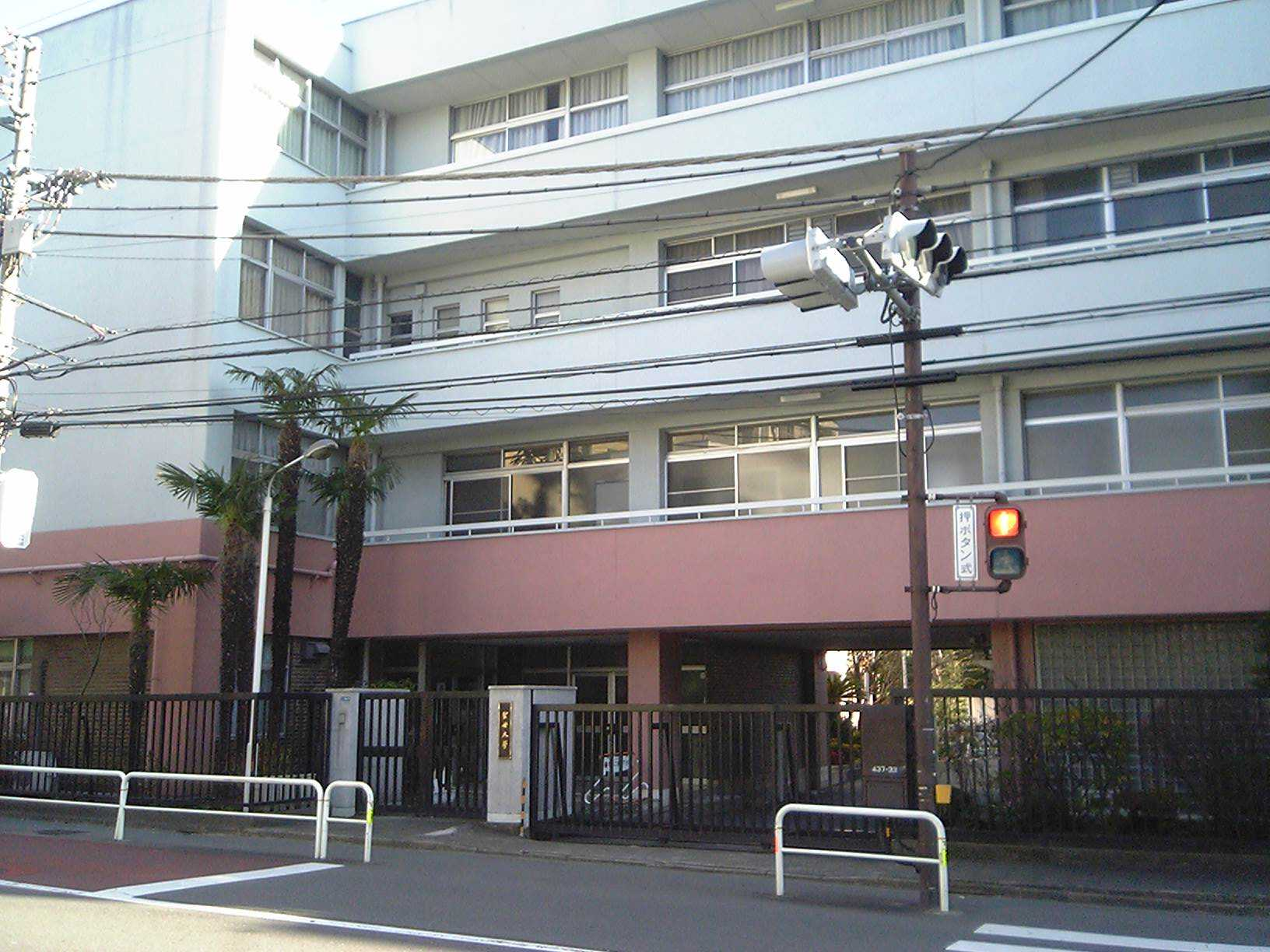 聖母大学